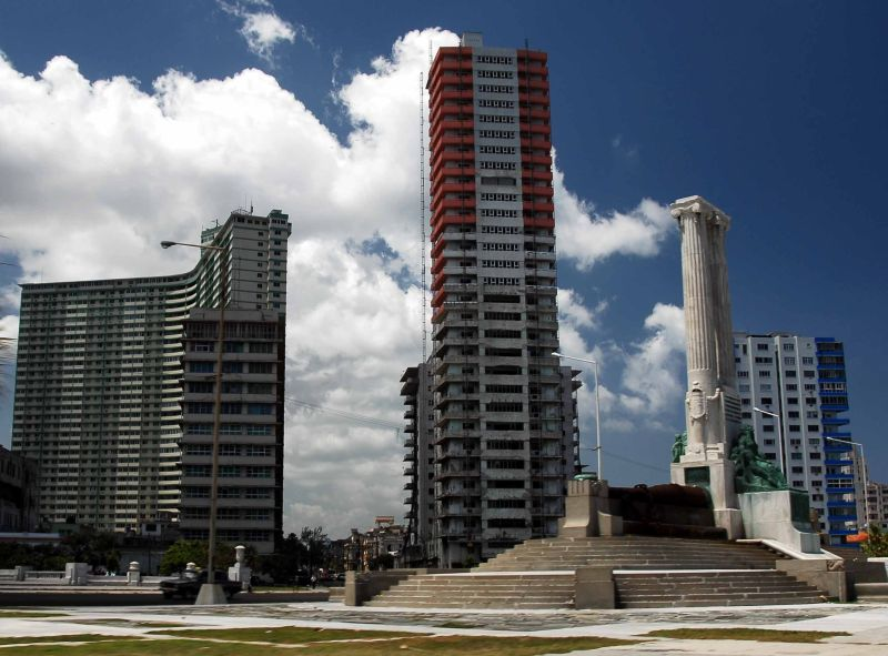 Cuba, september 2005, info in de Metadata